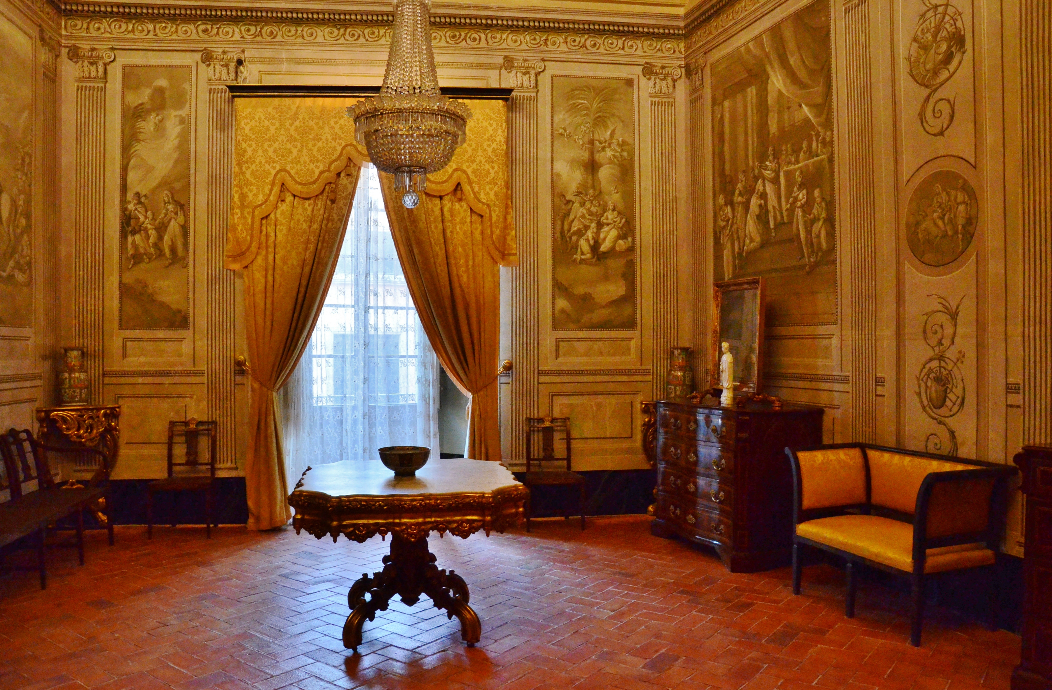 Museu Romàntic Can Papiol (Vilanova i la Geltrú)